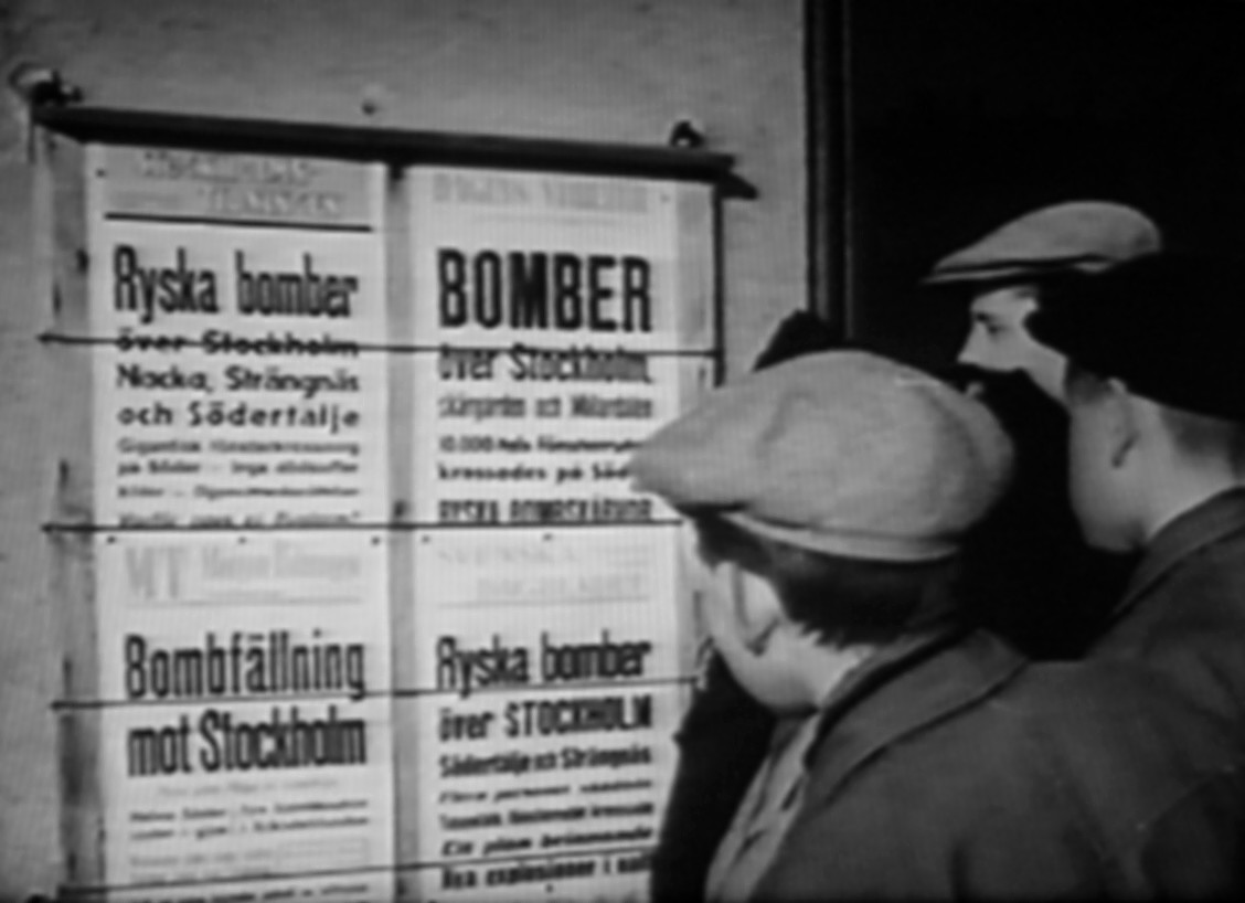 Löpsedlar efter att ryska bomber fallit över Eriksdalsområdet i Stockholm februari 1944